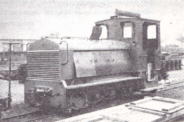 Locomotive Schneider type LG de 10 t, châssis Péchot. Moteur à essence 4 cylindres